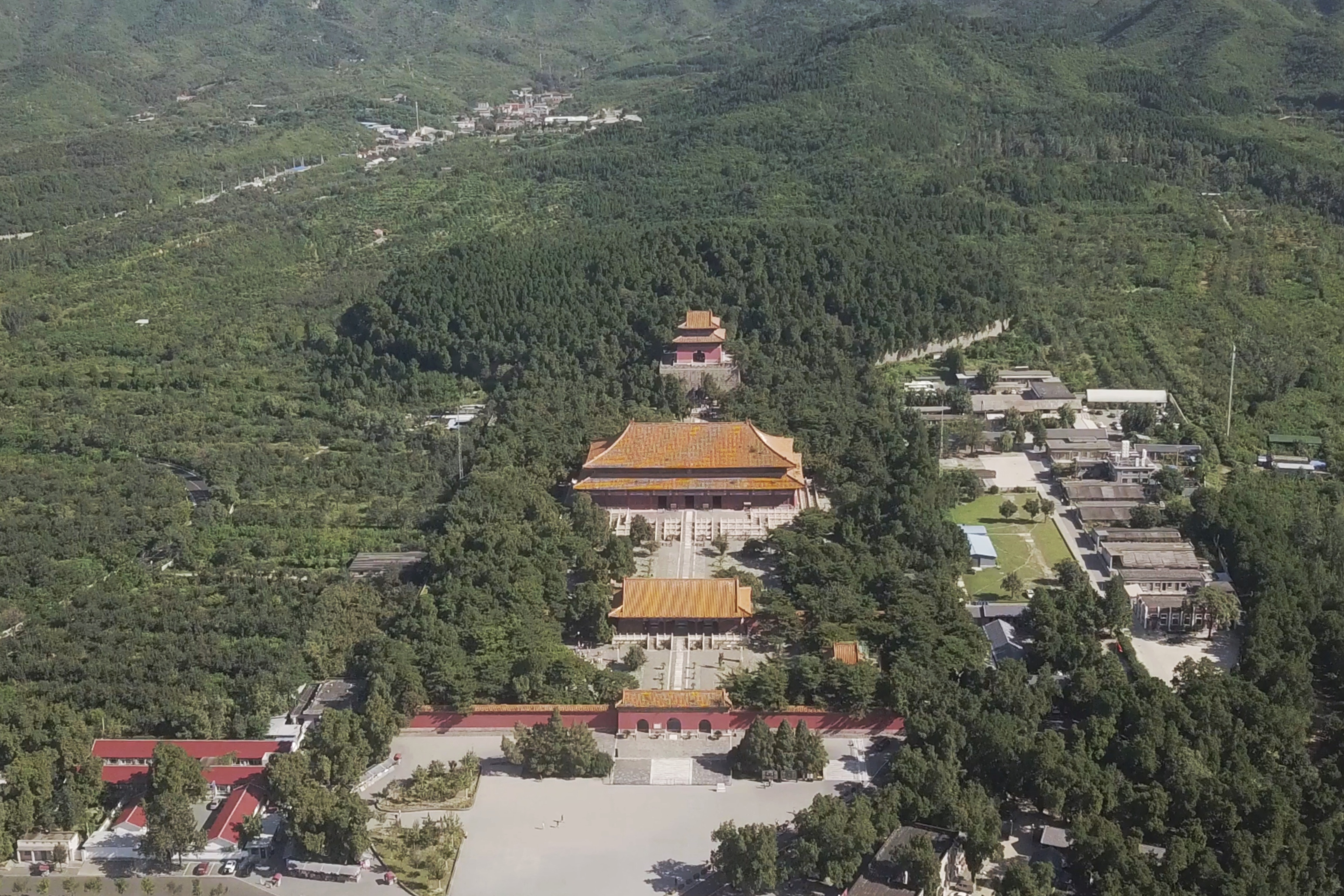 中文（中国大陆）: 明长陵，明成祖朱棣（永乐帝）的陵墓，2018年拍摄